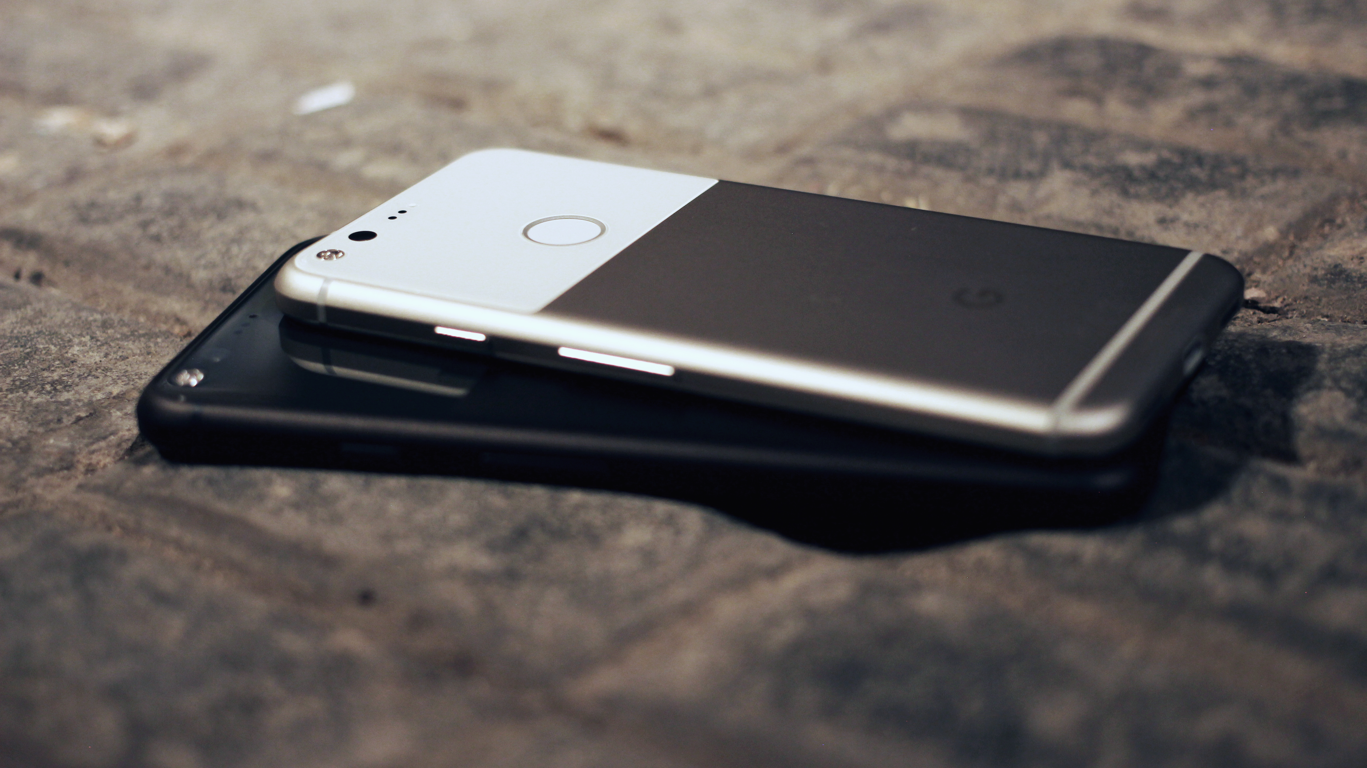 Google Pixel and Pixel XL smartphones